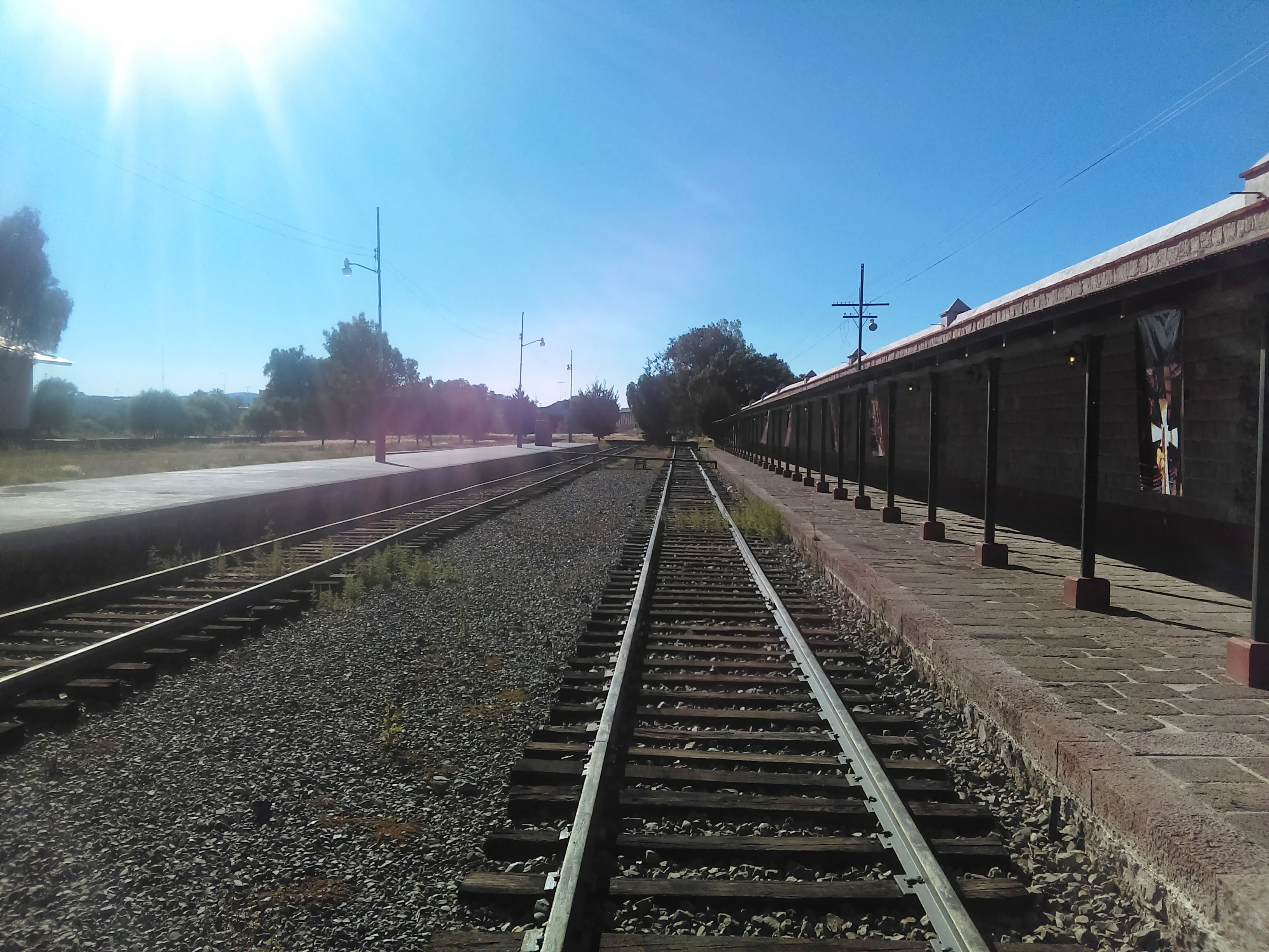 Centro Cultural del Ferrocarril en Pachuca, México